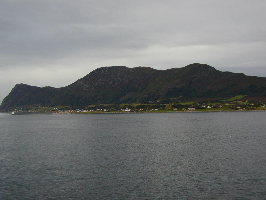 Godøya